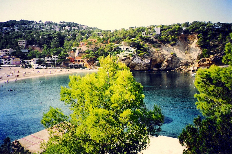 Vista de Cala Vedella des del nord (Eivissa)